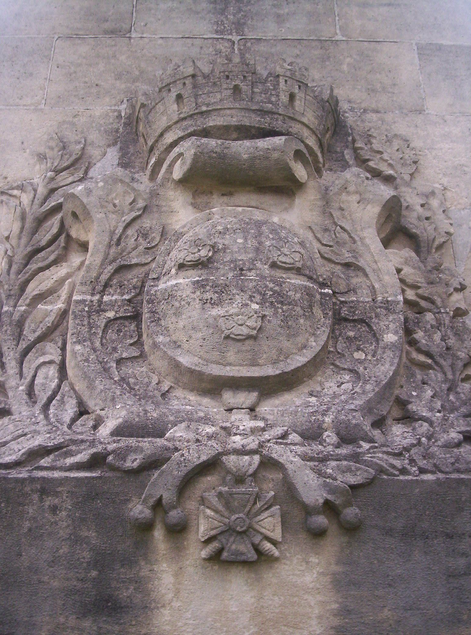 armorial d'Épernay sur un monument en hommage aux victimes du travail - cimetière d'Épernay